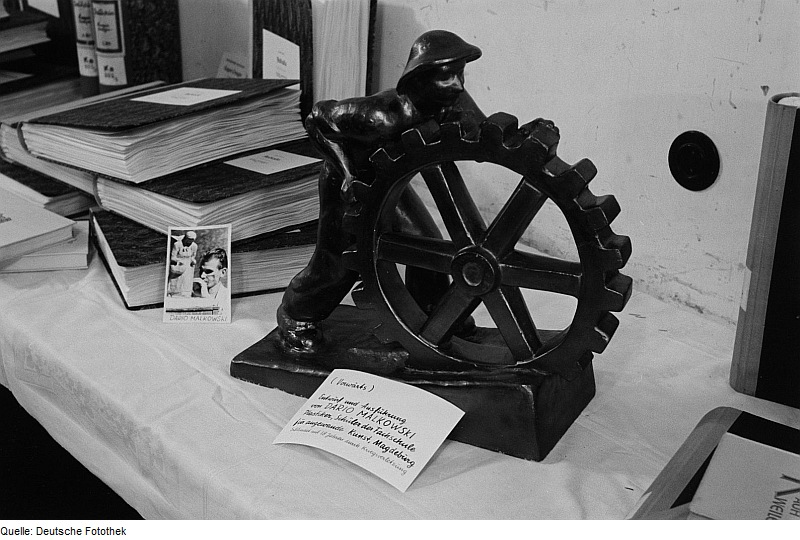 Original image description from the Deutsche FotothekPlastik von Dario Malkowski, Schüler der Fachschule für angewandte Kunst Magdeburg, erblindet mit 18 Jahren